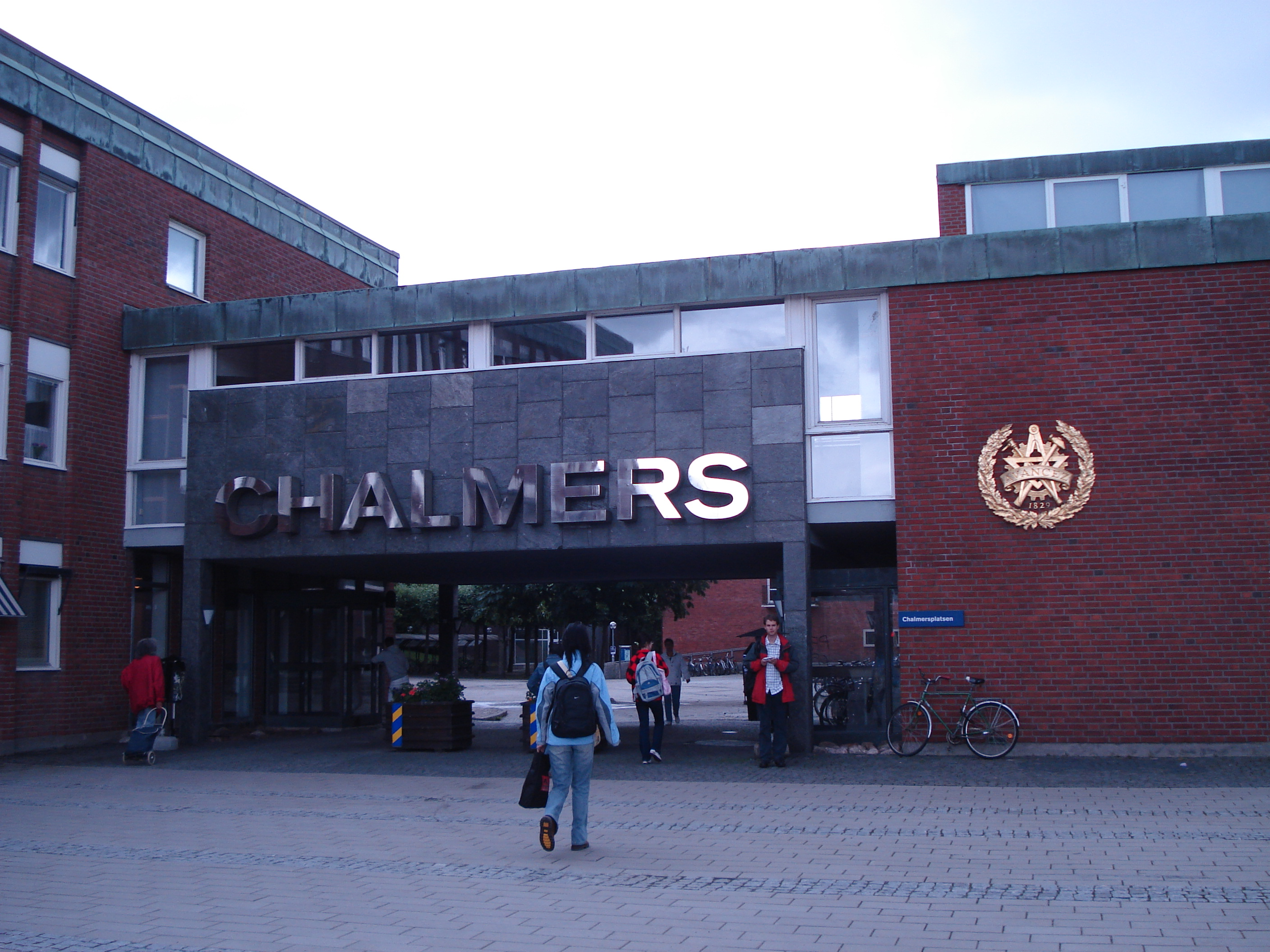 CTH校门